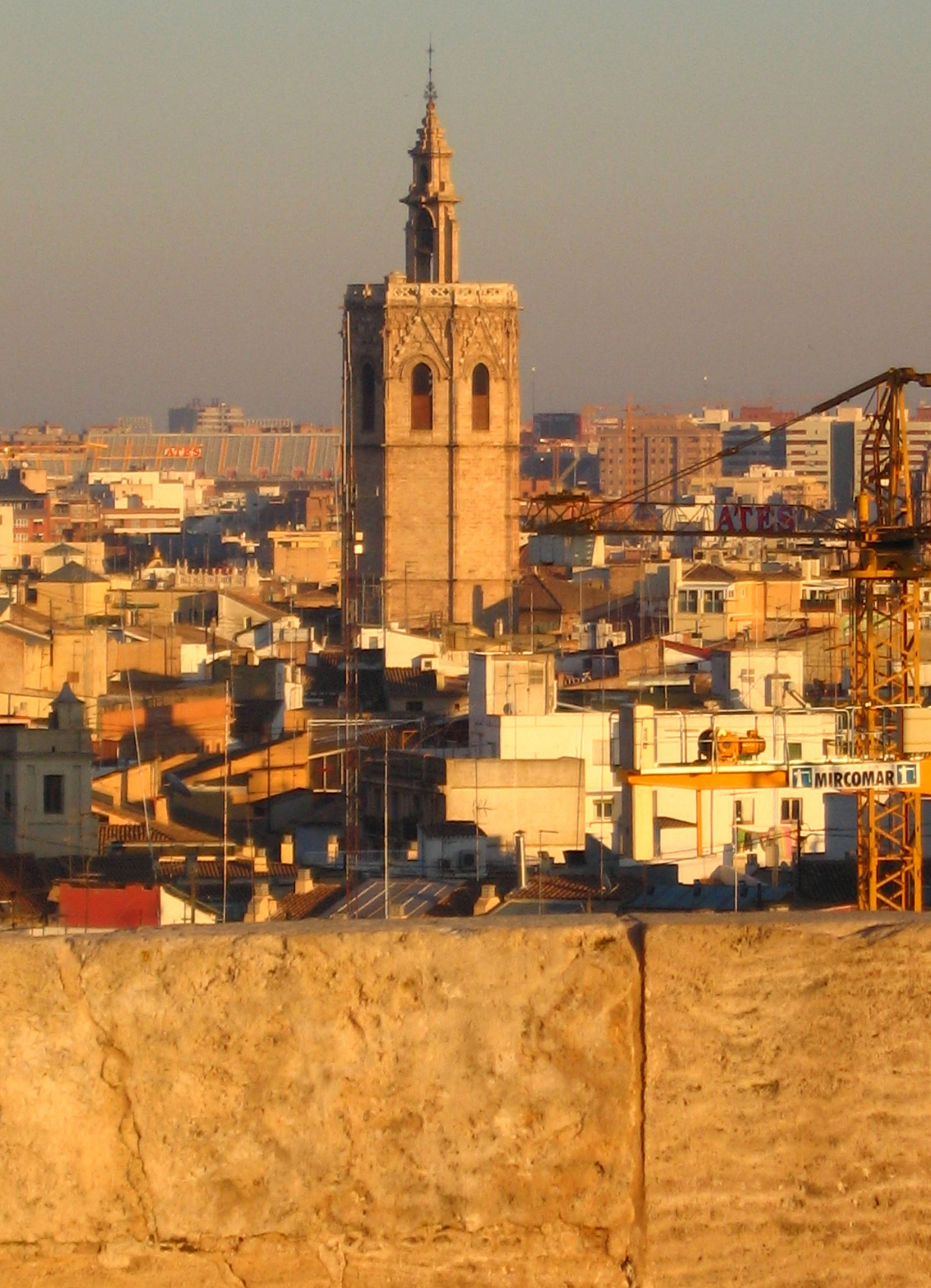 Vista del Micalet de València